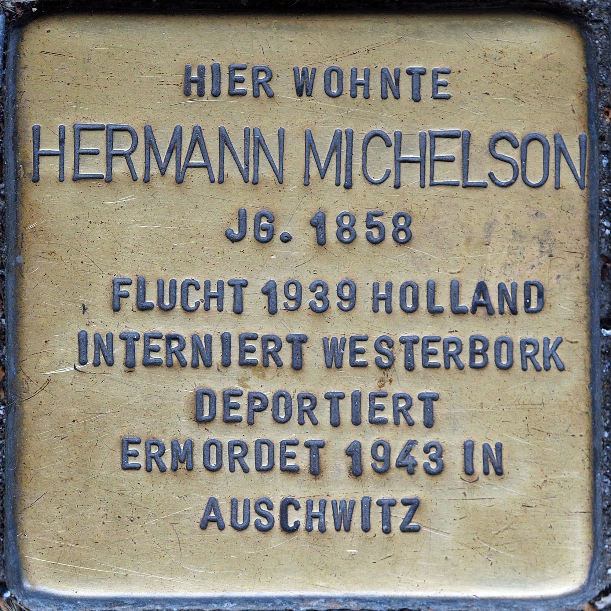 Stolpersteine MG: Michelson, Hermann